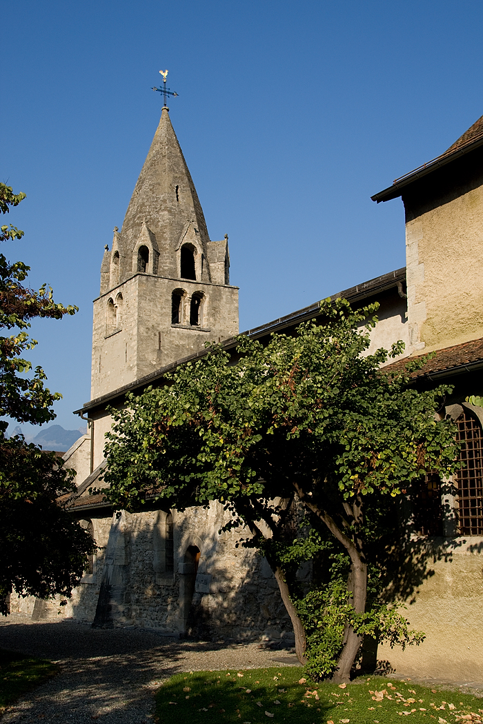 Kirche St. Maurice in Aigle